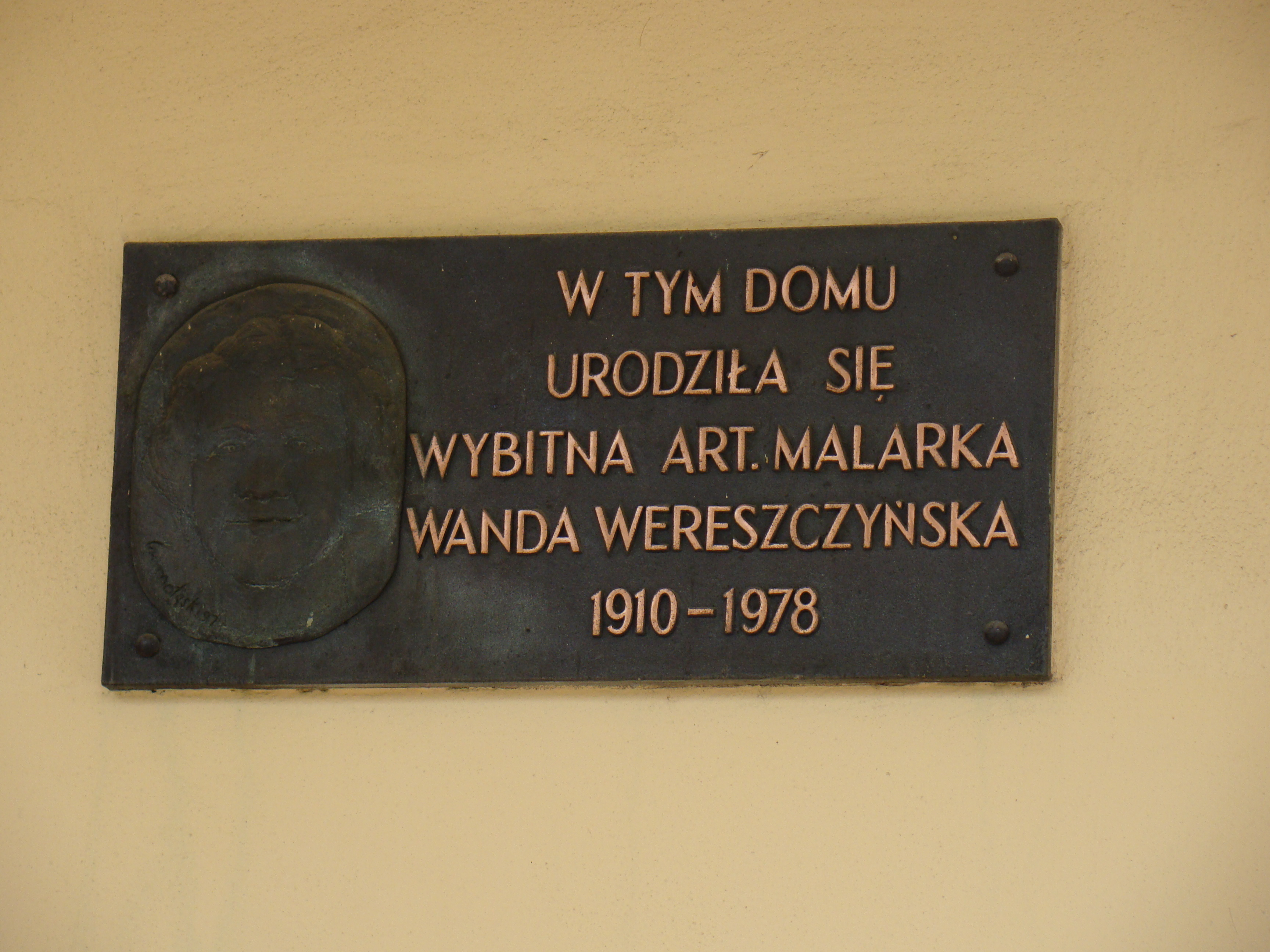 Kościelec, dwór, XIX